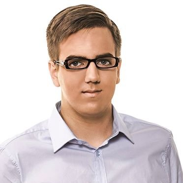 Richard veres